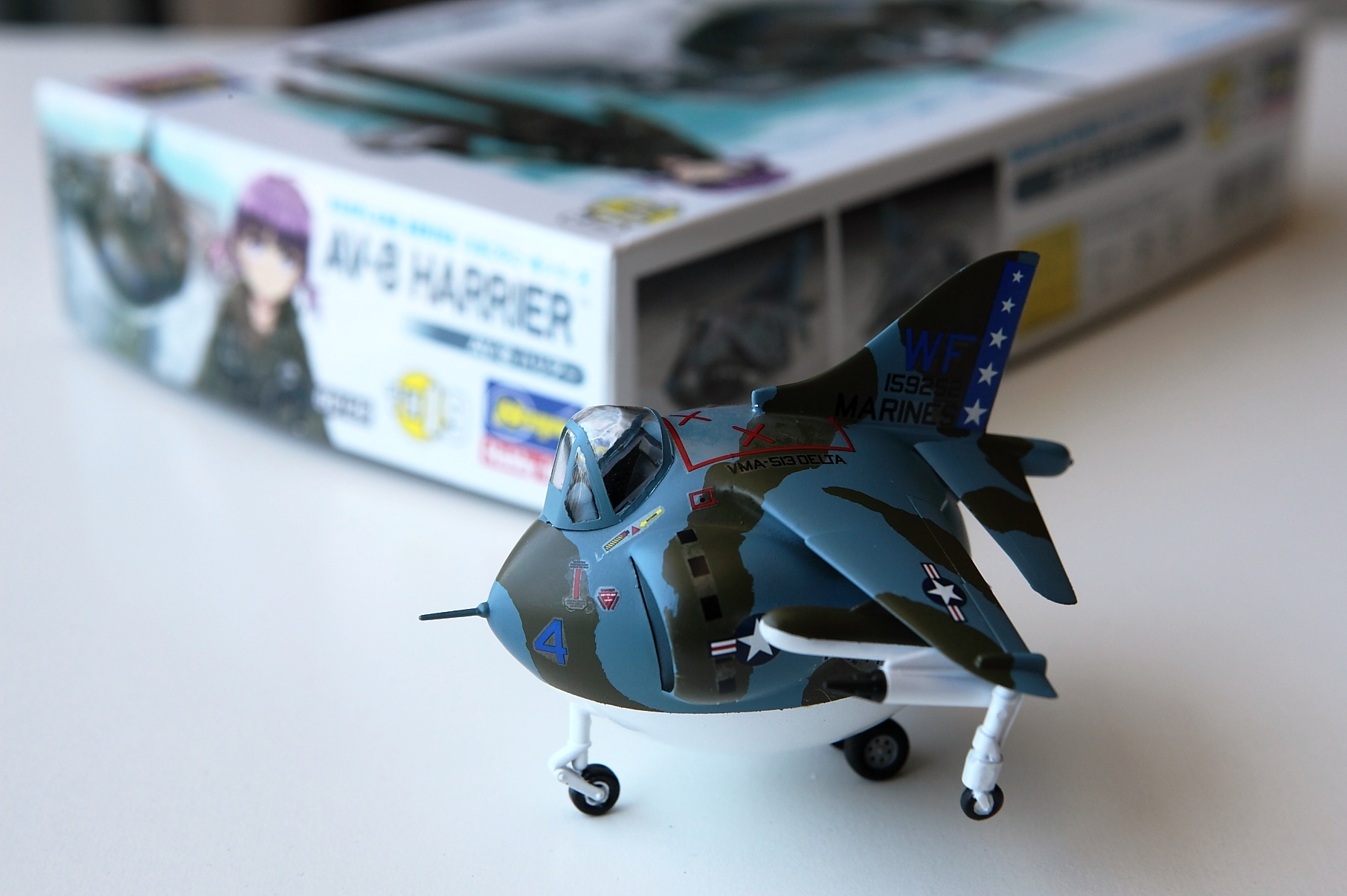 模型 Egg Plane